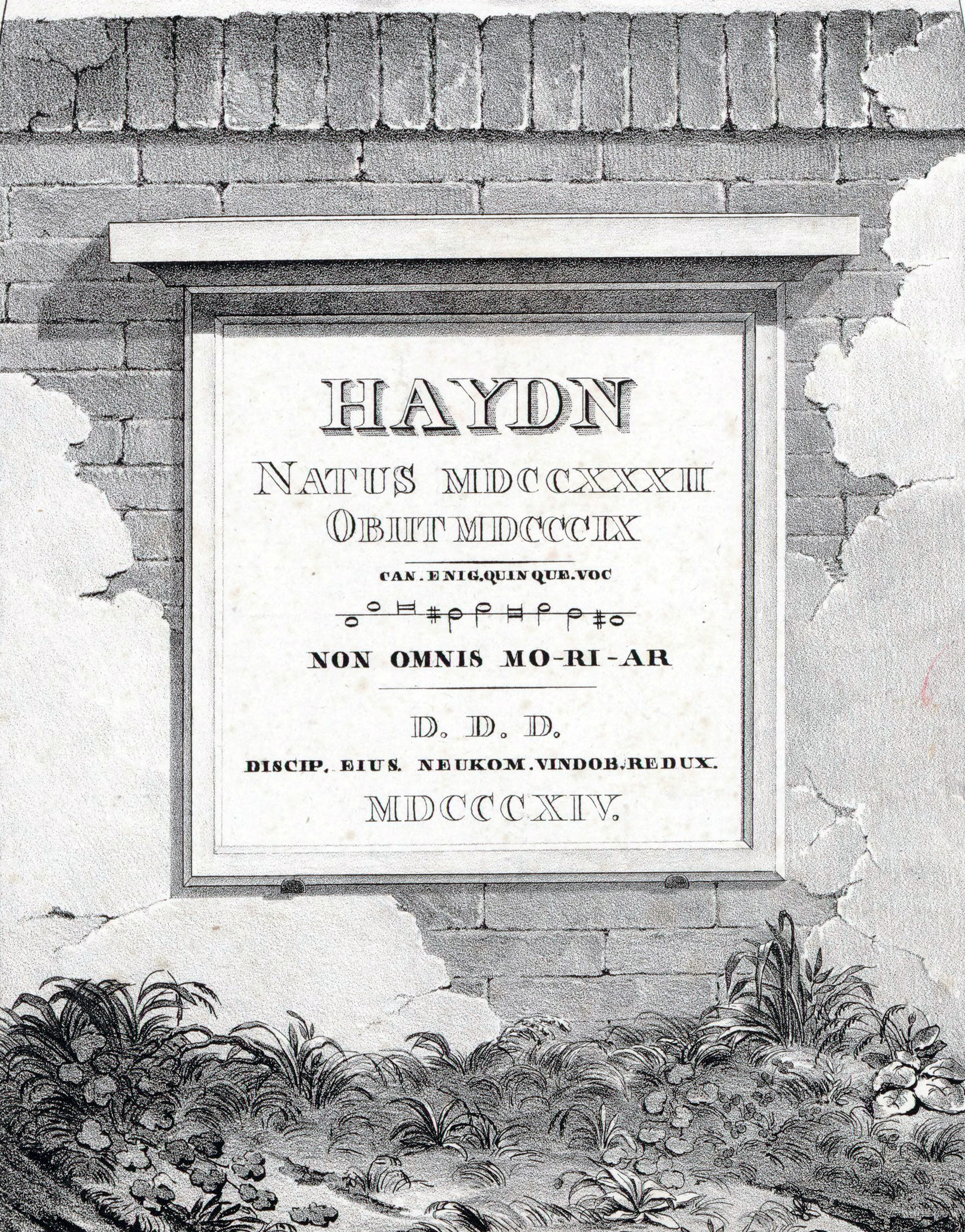 Gravestone of composer Joseph Haydn. Inschrift von Sigismund von Neukomm